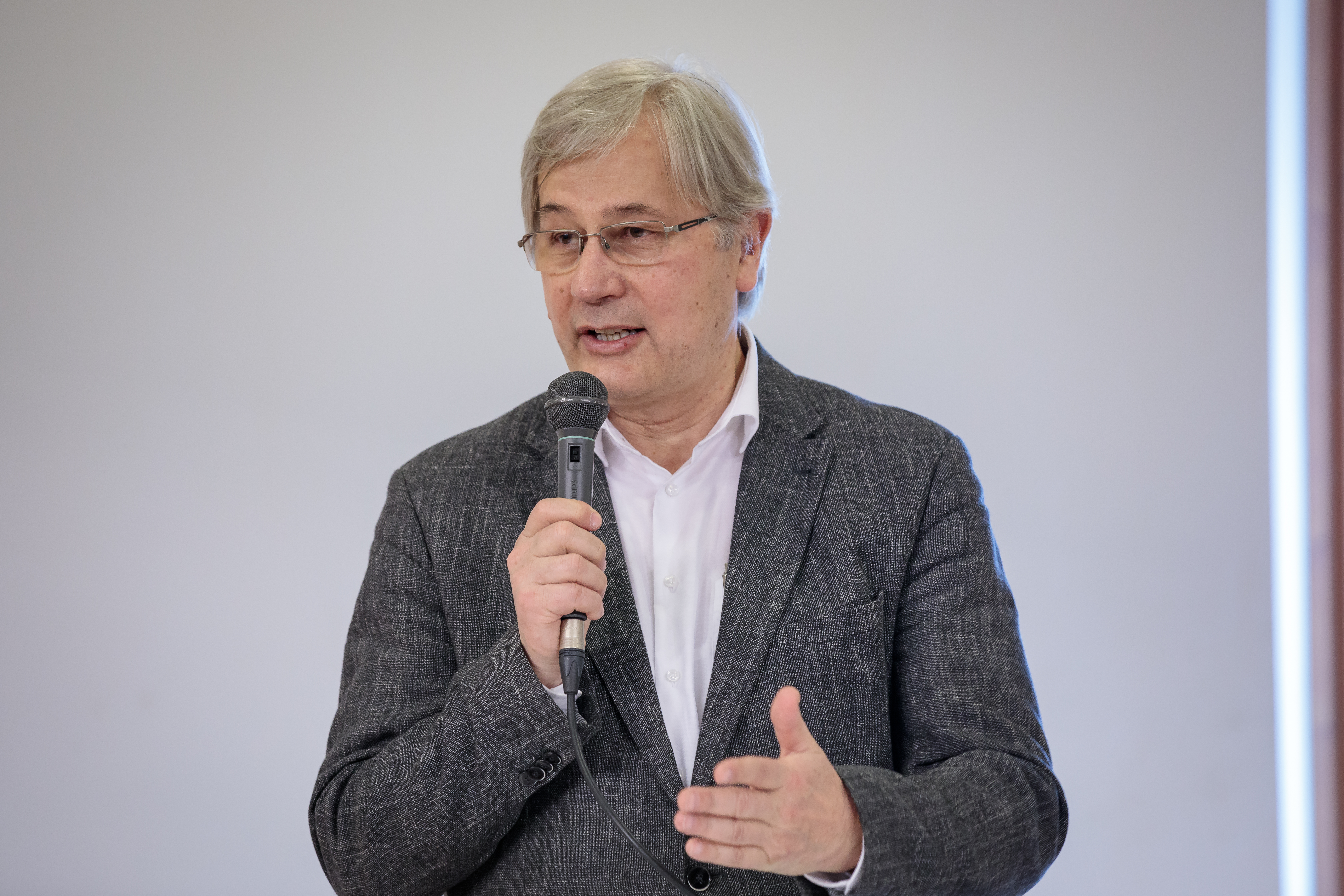 Eröffnung / Opening Robert Schauer, Kurator und Bergsteiger / Curator and climber Laufzeit / Duration: 13.04.2019-31.10.2020 Kuratiert von / curated by Robert Schauer Foto / Photo: Universalmuseum Joanneum/N. Lackner